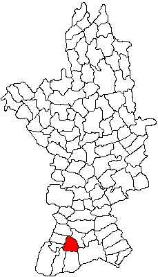 Categorie:Hărţi ale judeţului Olt